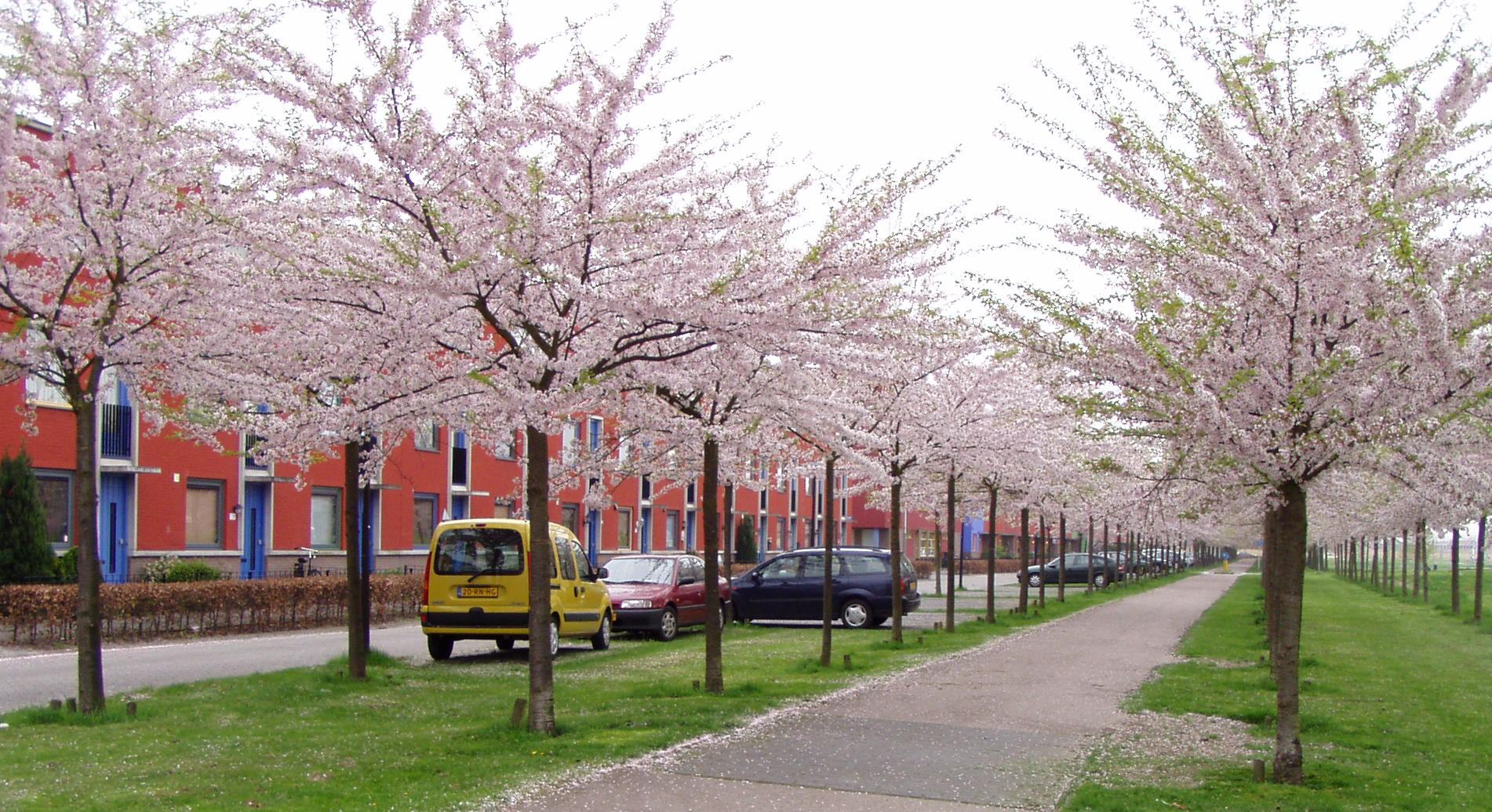 Jaarlijkse bloei aan de Terracottastraat, Almere